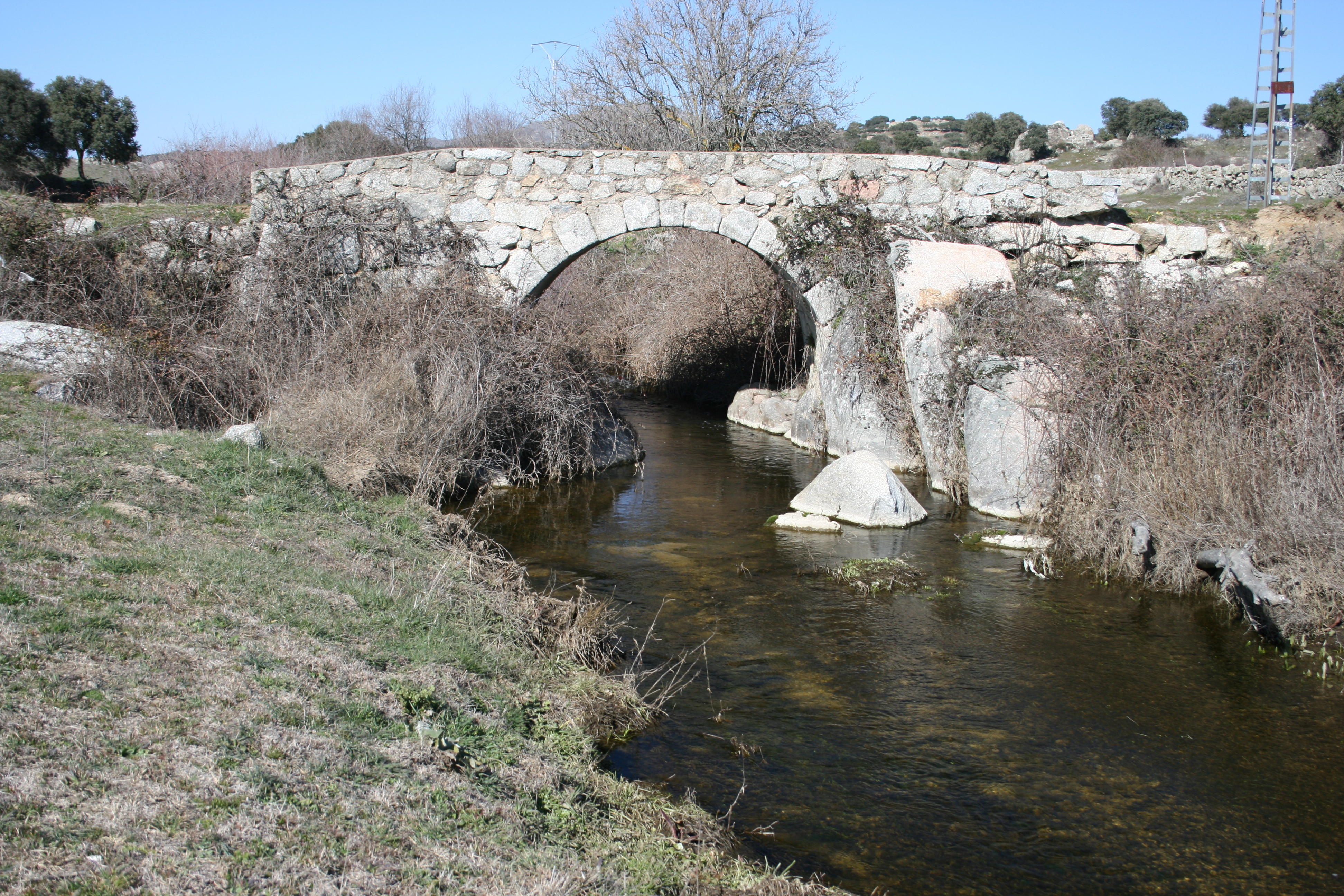 Arroyo de Tejada a su paso por Colmenar Viejo, Madrid (España). Afluente del río Manzanares.